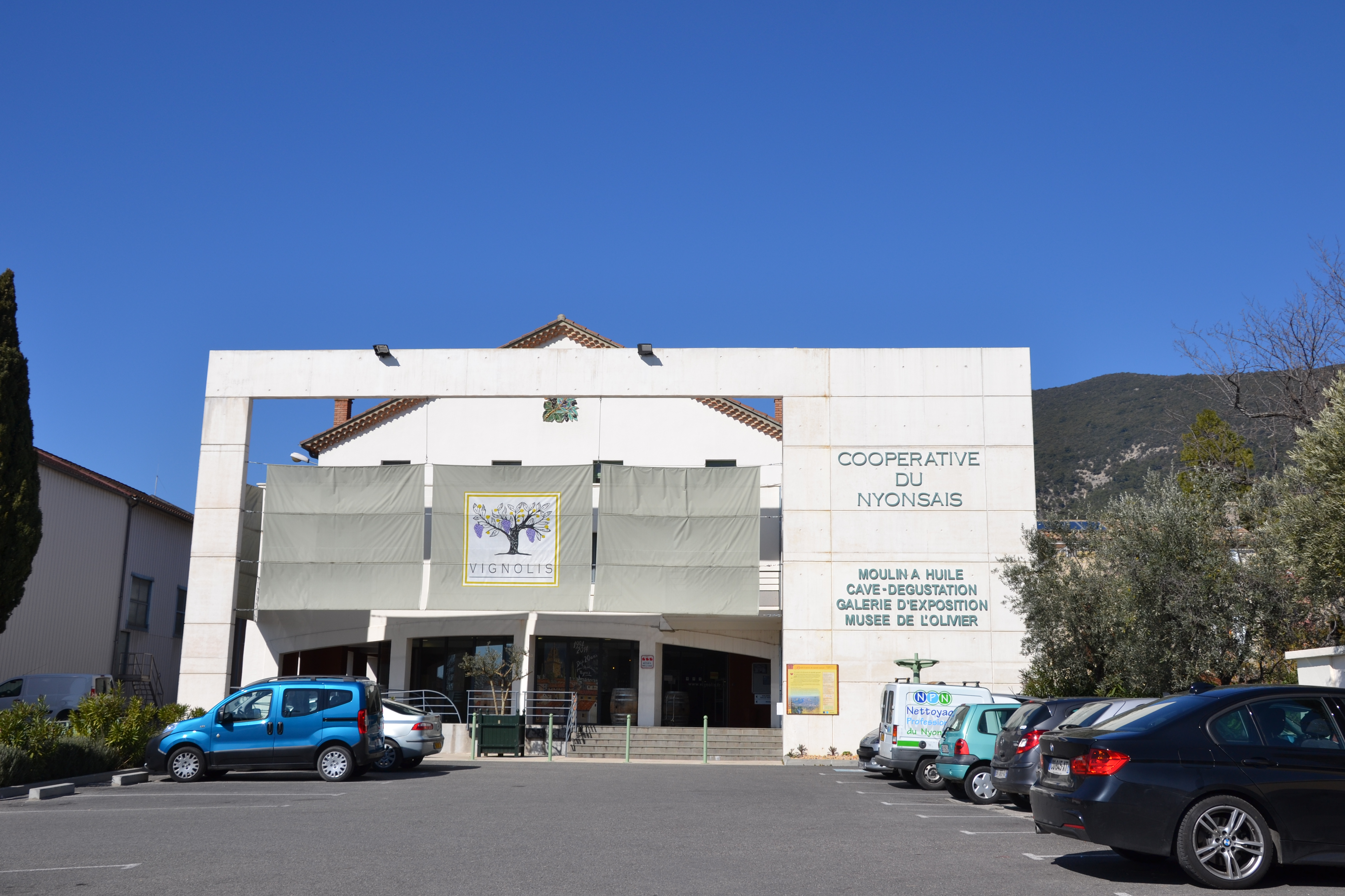 coopérative oléicole et musée de l'huile à Nyons